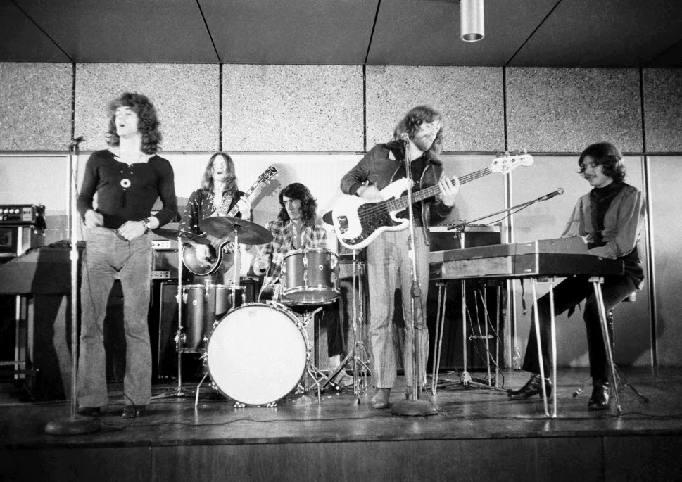 in der Neuen Mensa der Christian-Albrechts-Universität (CAU).